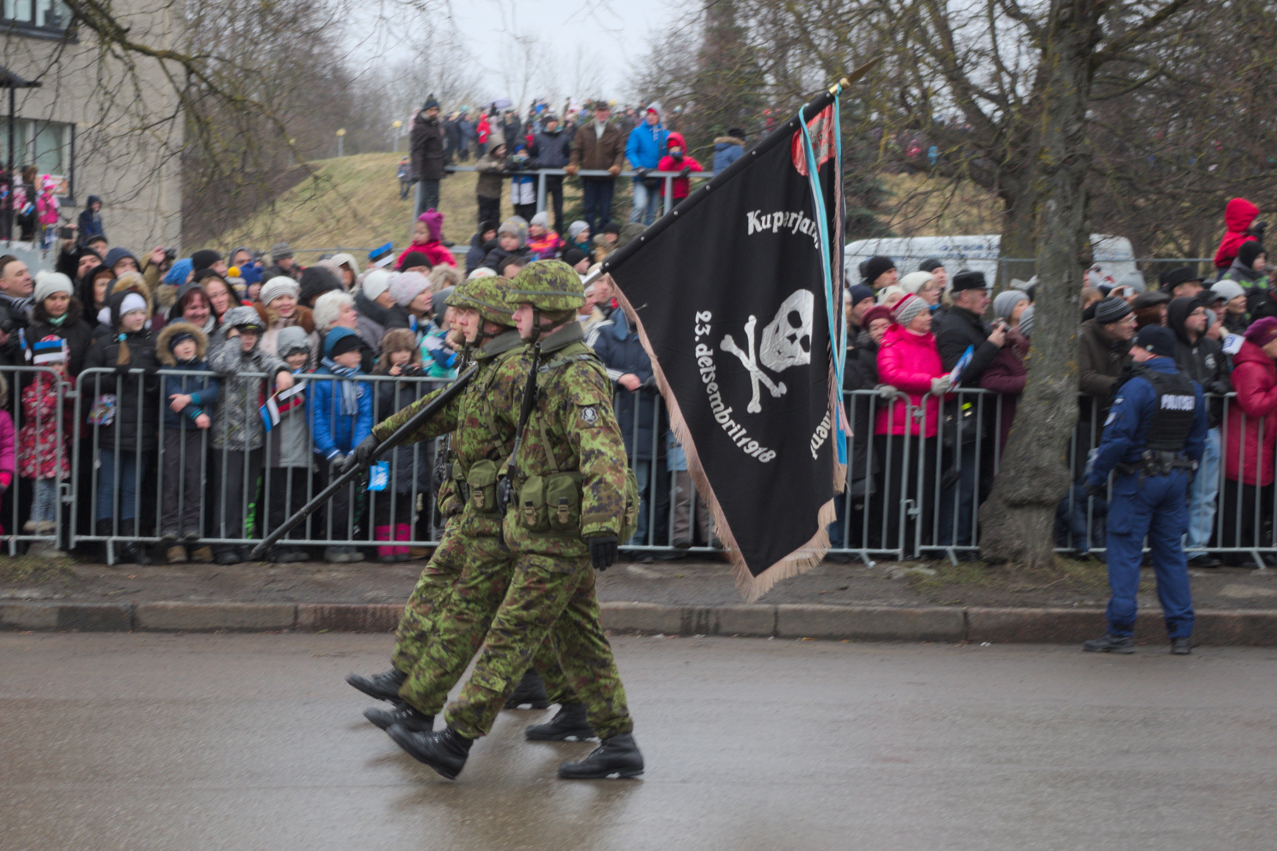 Kuperjanovi jalaväepataljoni lippurid Iseseisvuspäeva paraadil